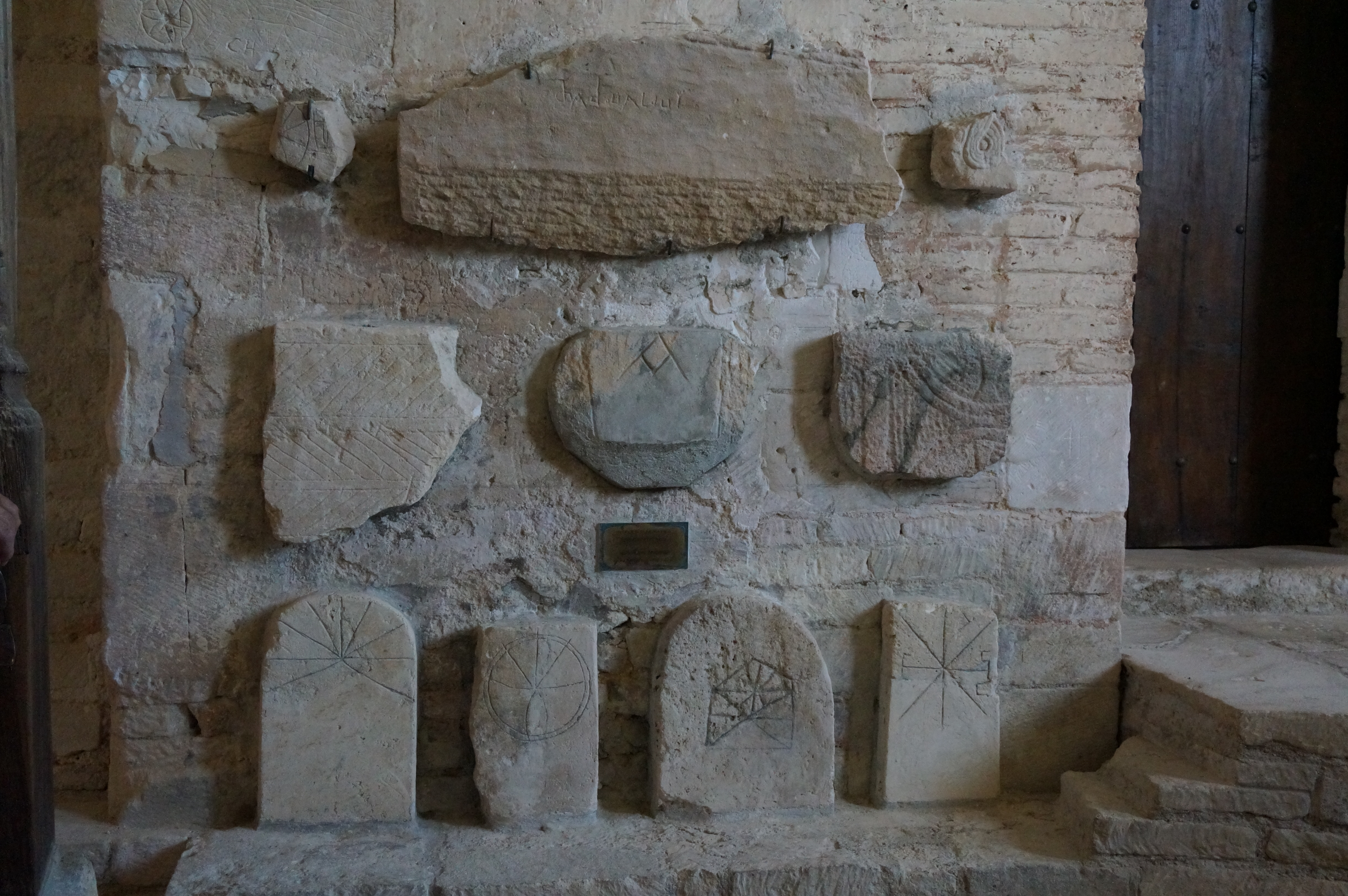 Isle-Aumont (Aube, France), église Saint-Pierre et nécropoles; de haut en bas: sarcophage de Chadoualdus, fragments de 3 sarcophages mérovingiens et 4 stèles.